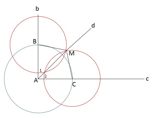 کوردی: لەتکردنی گۆشە